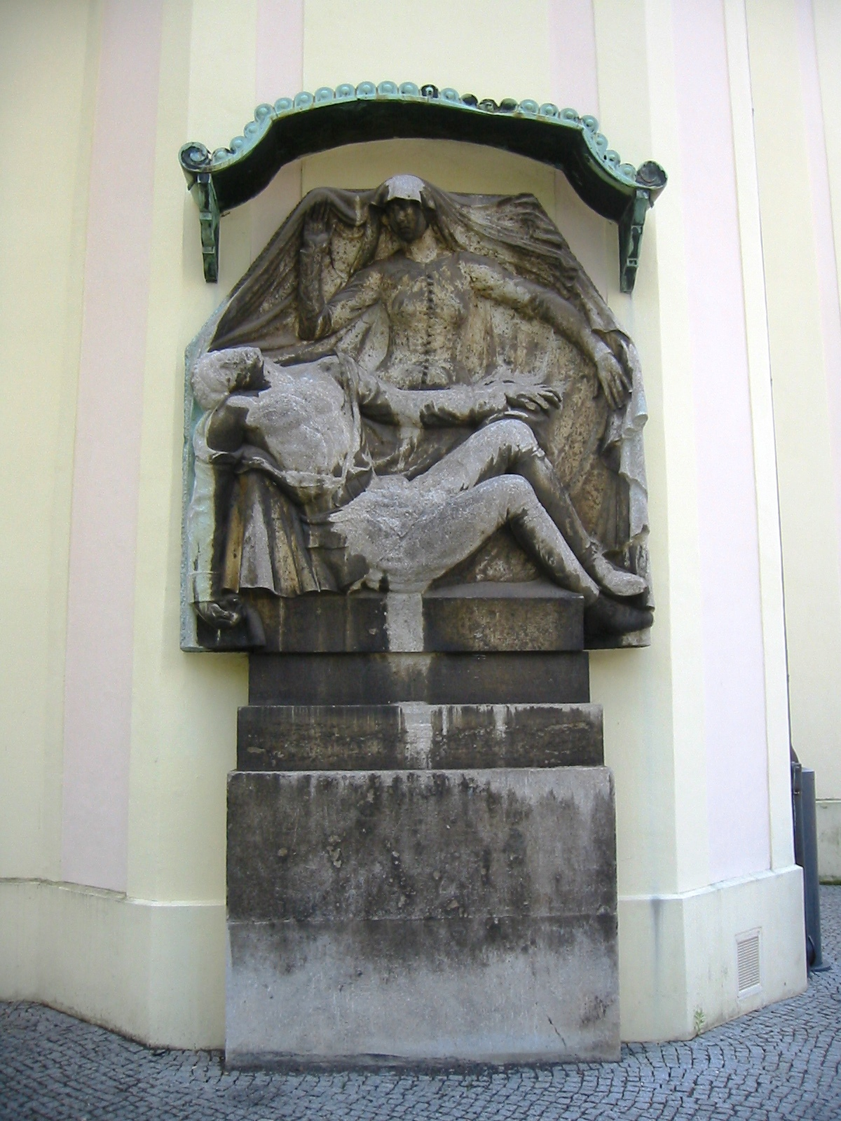 Pietà an der Nordfassade der Stadtkirche St. Nikolai in Forst (Lausitz)